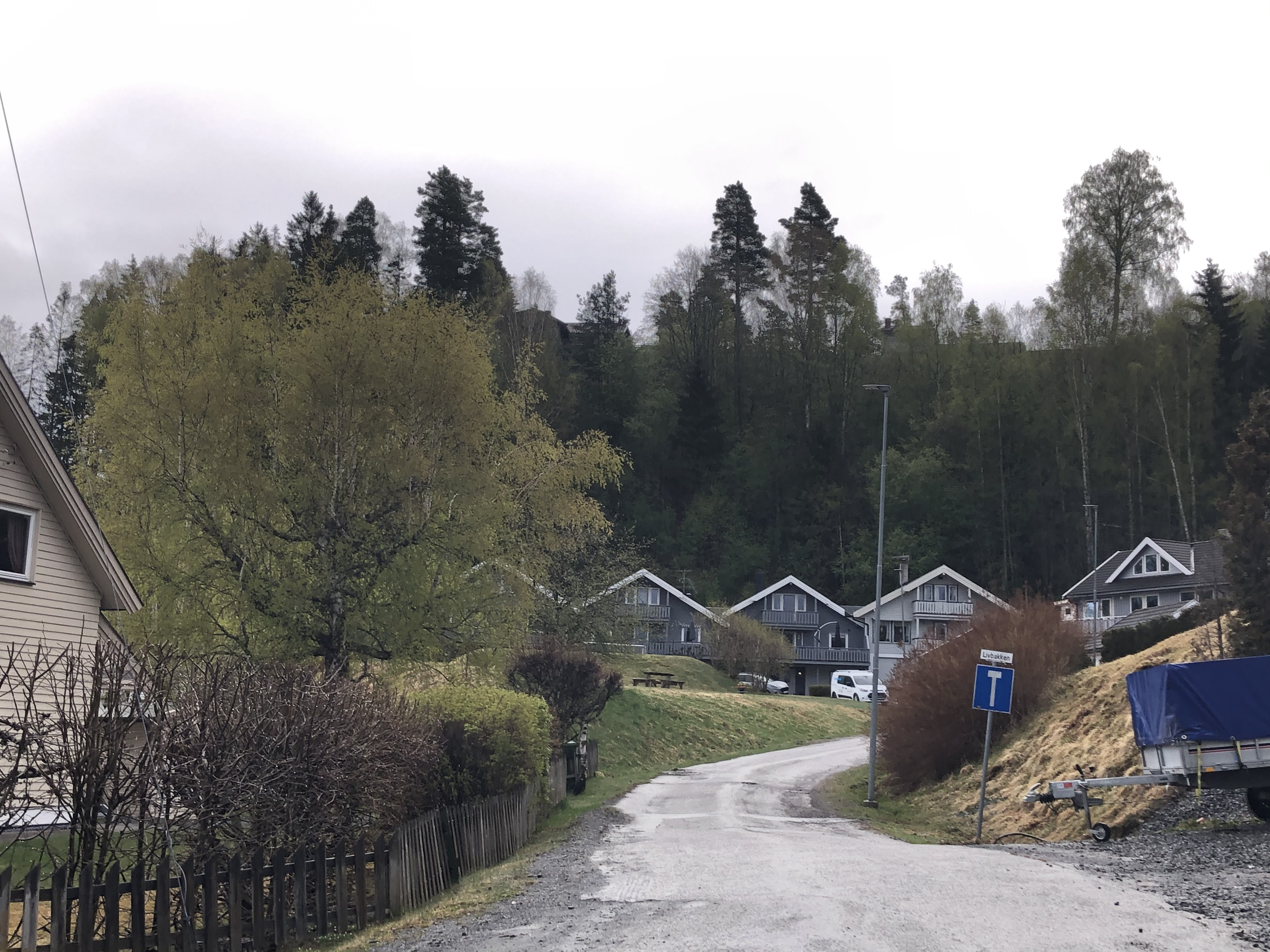 Livbakken, Ringerike